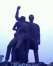 অমর একুশে ভাস্কর্য,জাহাঙ্গীরনগর বিশ্ববিদ্যালয়।